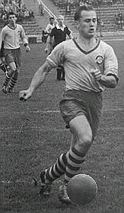 Title: ZSK-Vorwärts Berlin - SC Wismut Karl-Marx-Stadt Factual corrections and alternative descriptions are encouraged separately from the original description. Additionally errors can be reported at this page to inform the Bundesarchiv. Original historic description: Zentralbild-Funck Ro-Eg. 25.9.1955 ZSK-Vorwärts Berlin - SC Wismut Karl-Marx-Stadt - Am 25. September 1955 fand im Friedrich-Ludwig-Jahn Sportpark in Berlin das Punktspiel zwischen den Oberliga-Mannschaften ZSK-Vorwärts-Berlin und SC Wismut Karl-Marx-Stadt statt. UBz: Der Mittelstürmer von Wismut, Tröger (rechts) schießt das 2. Tor für seine Mannschaft. (links) Marotzke (Vorwärts).